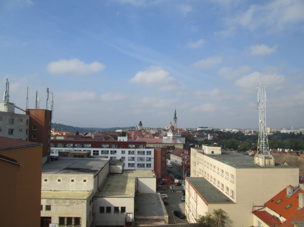 Pohled na táborskou věž z hvězdárny.